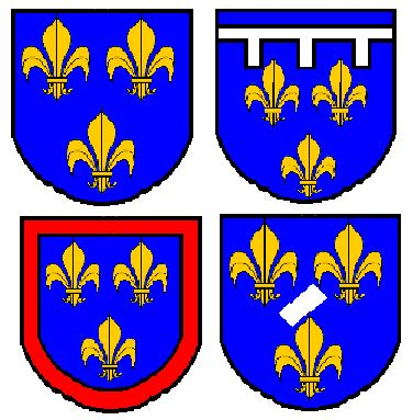 Eigen tekening Robert Prummel